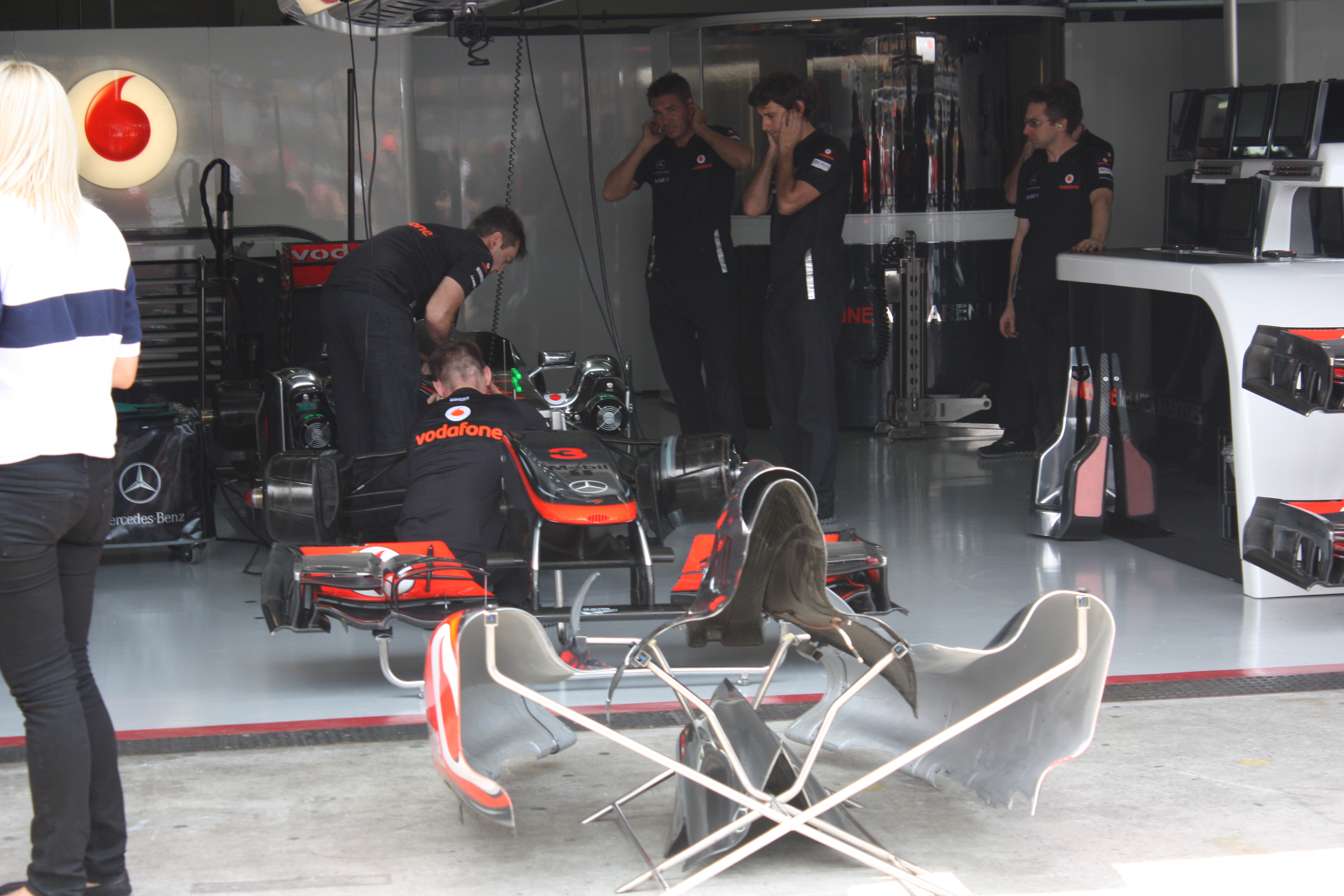 Box da McLaren